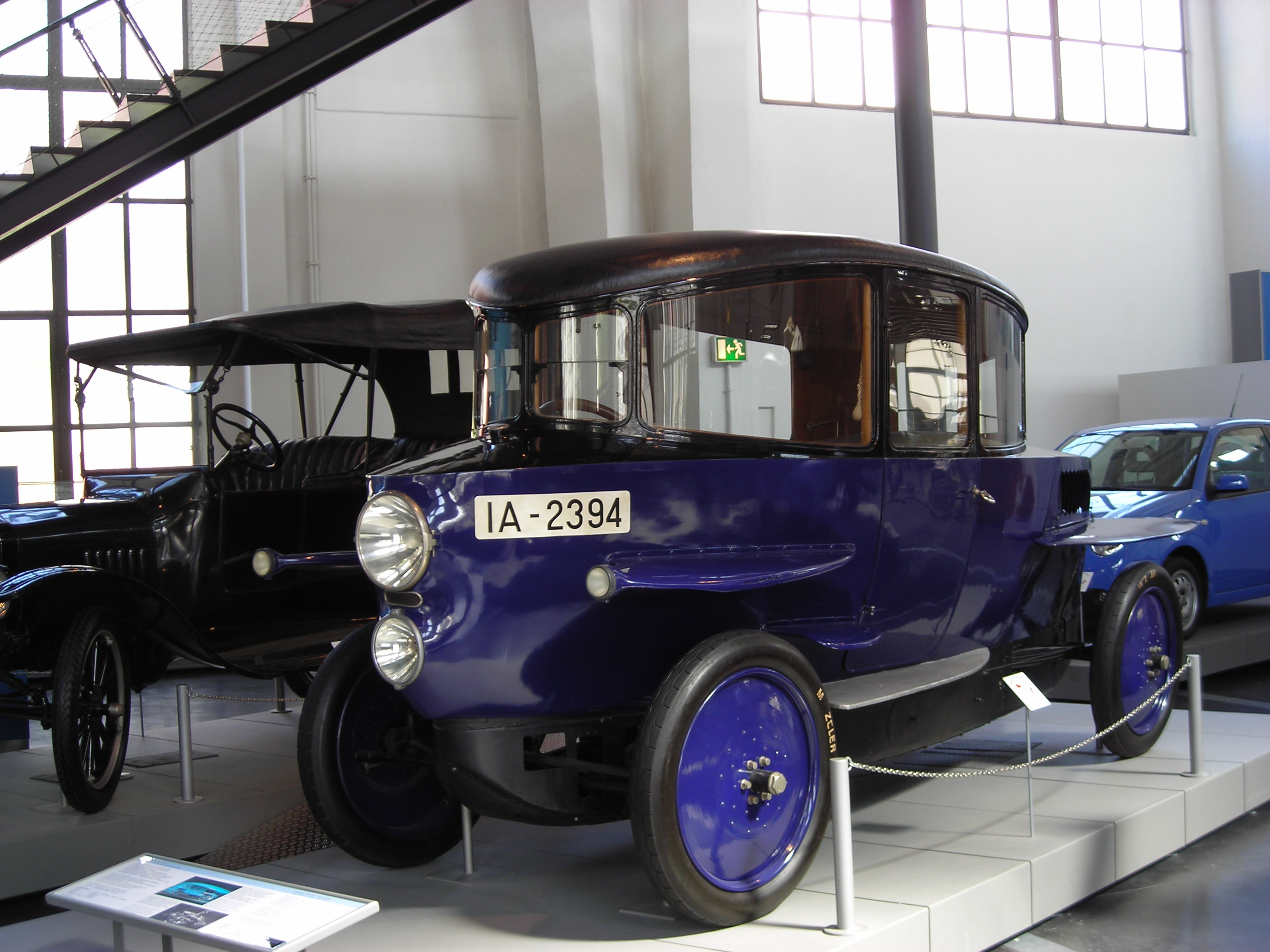 Rumpler-Tropfenwagen blau —Exponat im Deutschen Museum Verkehrszentrum München